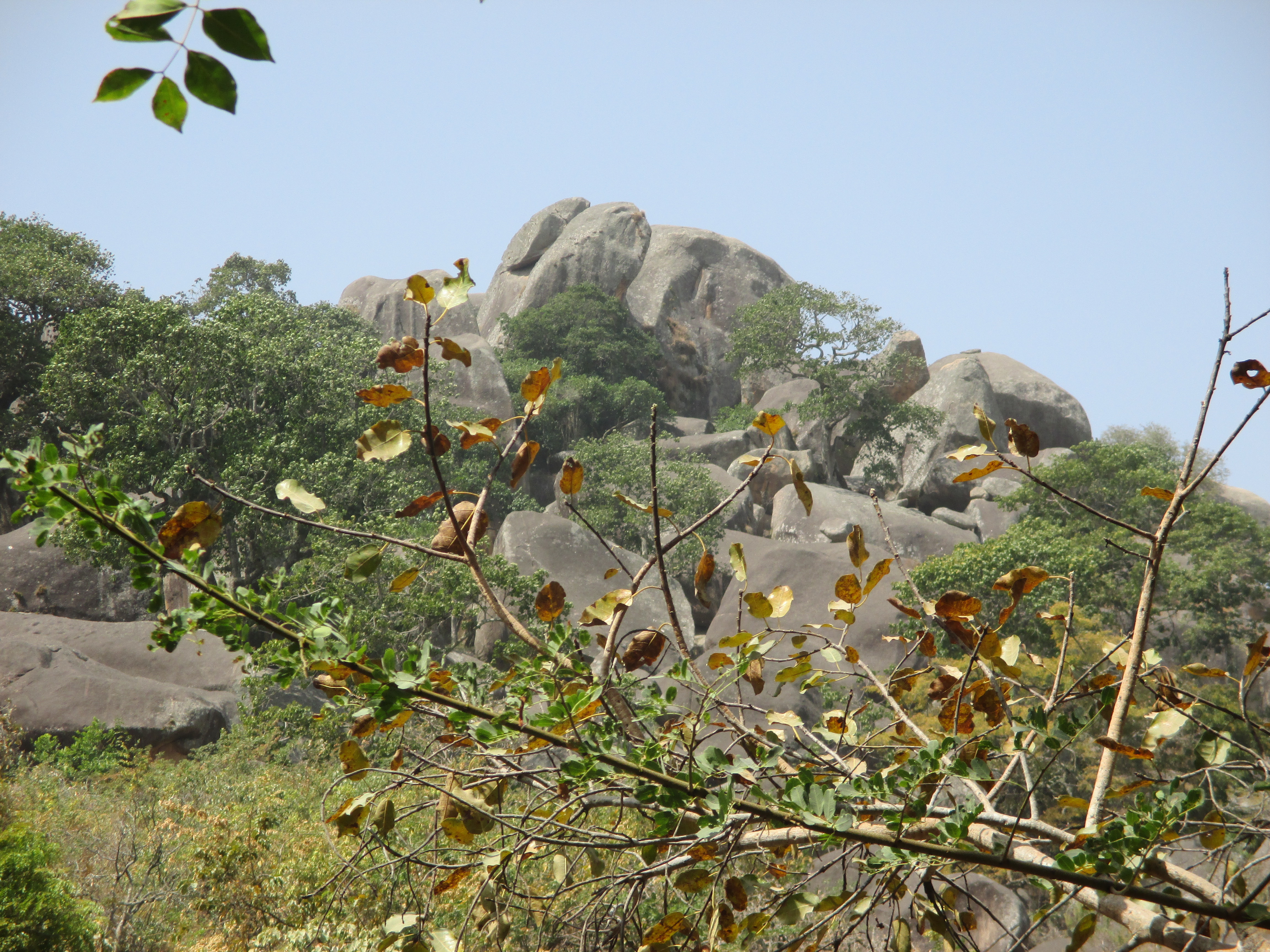 Mont Djim représente le symbole de Galim-Tignère